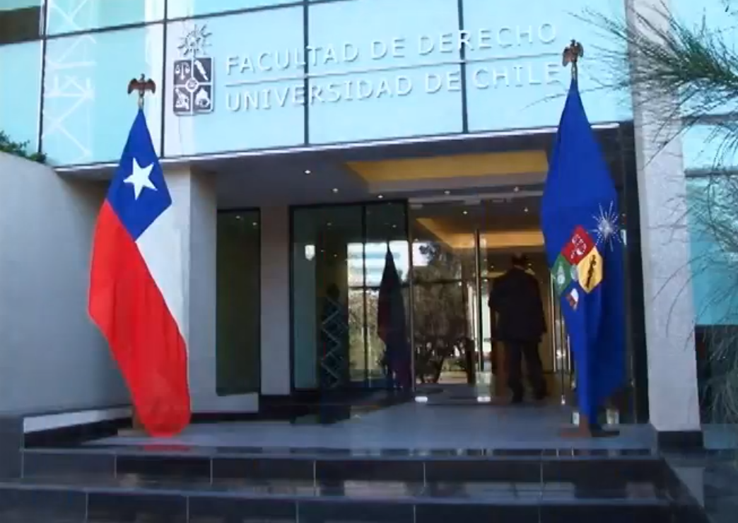 Edificio Santa María 200 Facultad de Derecho Universidad de Chile